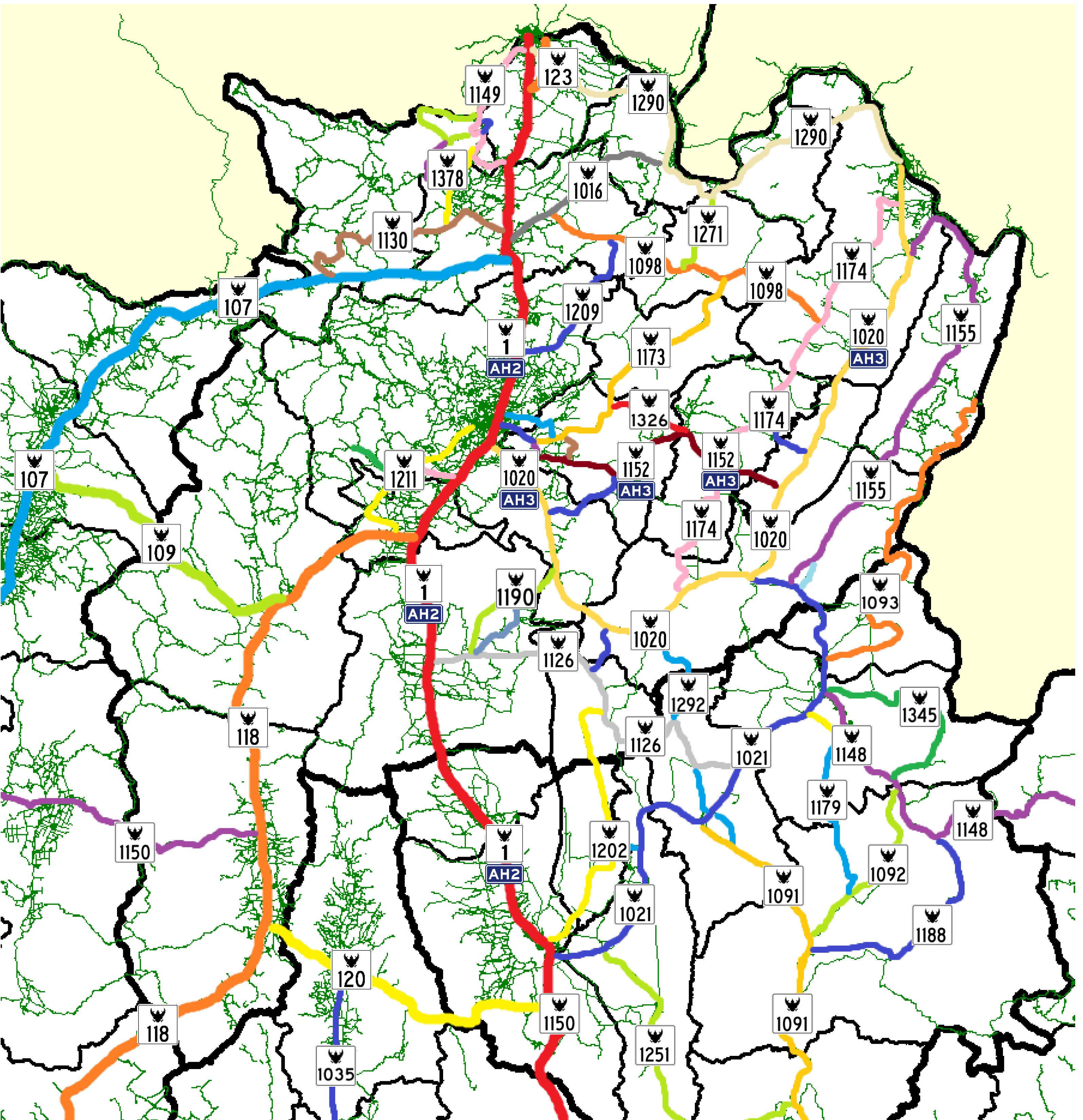 Chiang Rai Road Network